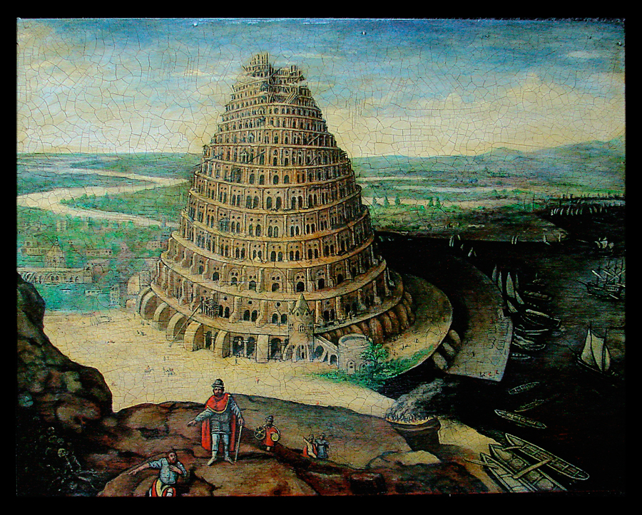 Le Tour de Babel after van Valckenborch